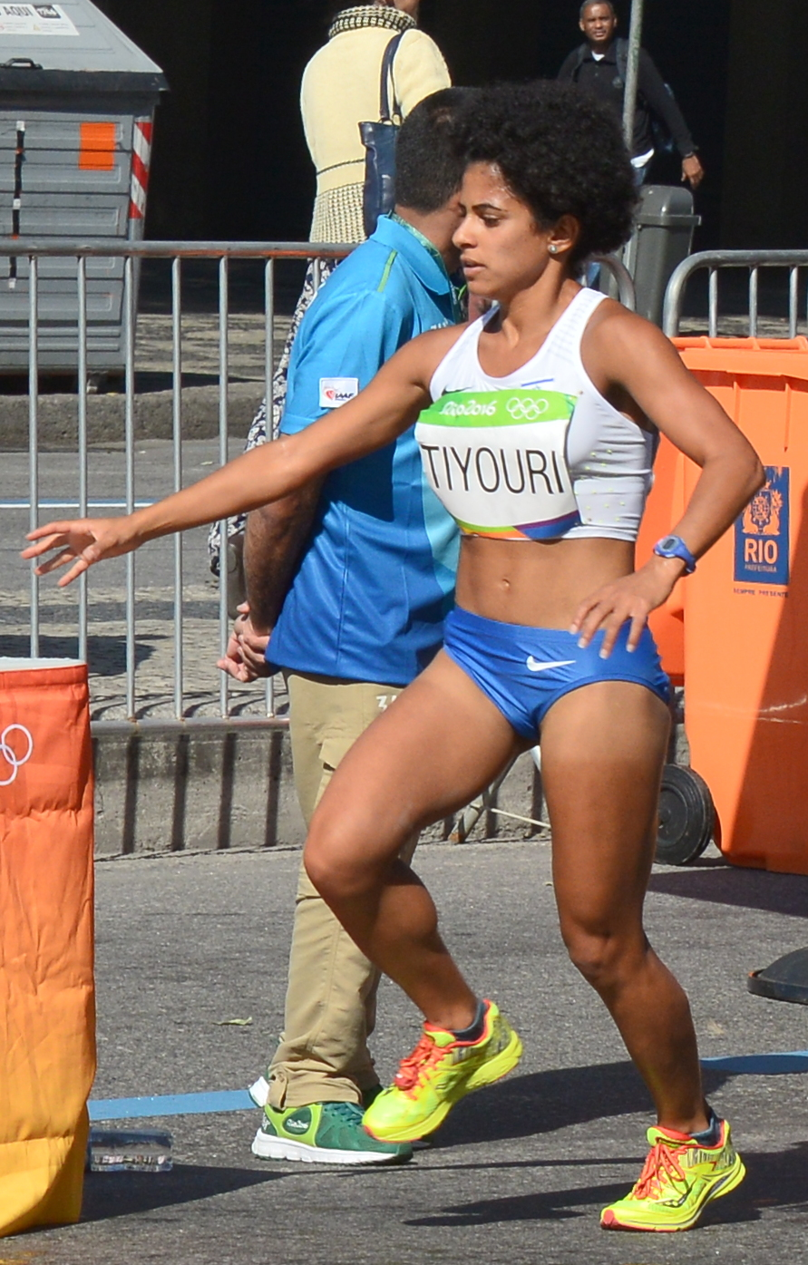 Passage du marathon des jeux olympiques de Rio 2016 dans le centre de Rio